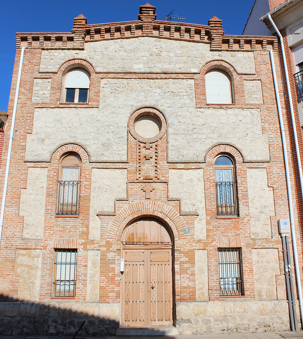 Fachada de la Iglesia Protestante San Pablo (Cigales)